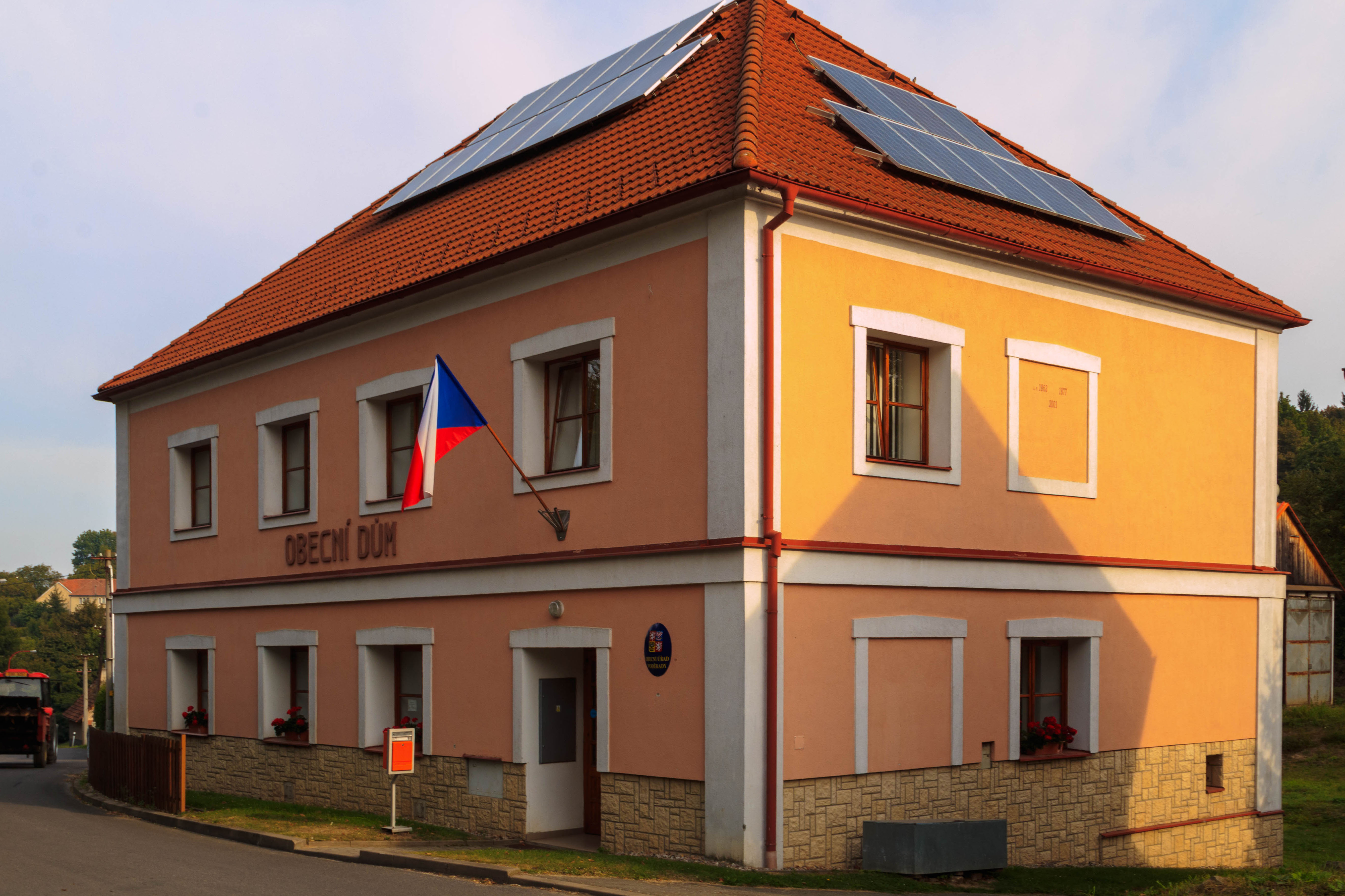 Voděrady - obecní úřad 01